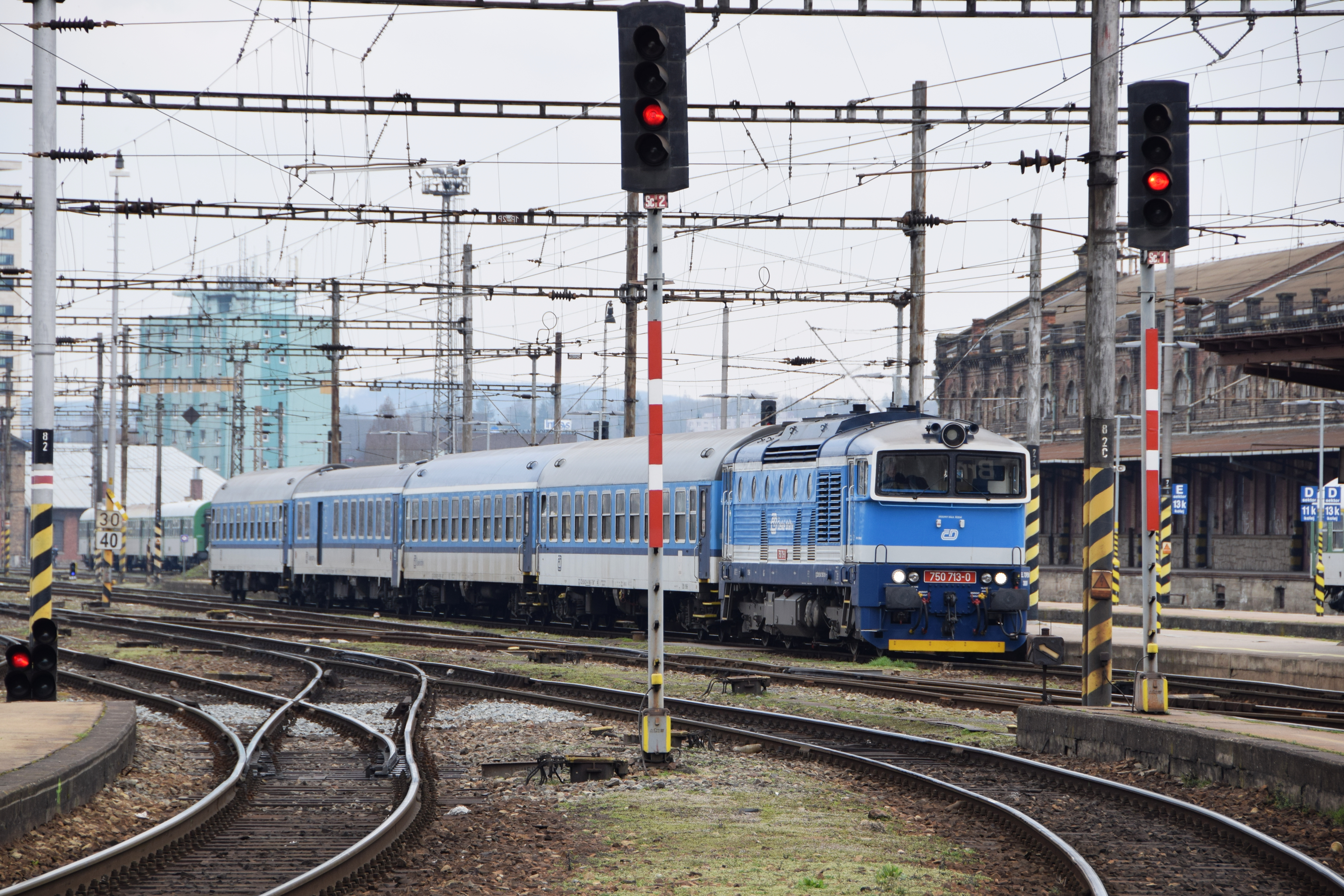 750 713-0 České dráhy (ČD) Brno 28.03.15